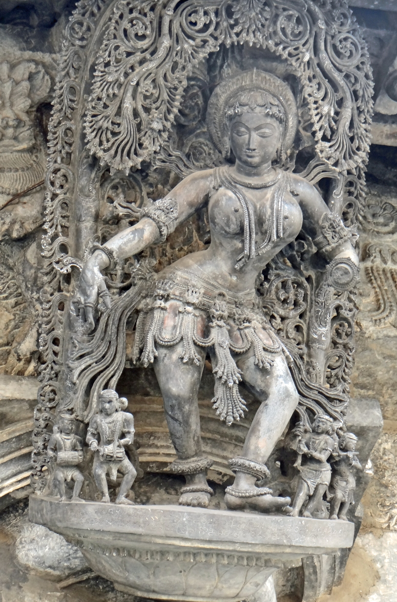 Madanika (ou Salabhanjika), jeune danseuse avec musiciens sur les murs du temple de Chennakeshava à Belur Le temple de Chennakeshava, dédié à une forme locale de Vishnou, a été construit en 1117 AD à Belur, par le roi Vishnuvardhana ou Bittideva (Bittideva était le nom du roi lorsqu'il était jaïn, il s'est converti à l'hindouisme au cours de son règne) probablement pour commémorer des succès militaires. Le complexe religieux est entouré d'une enceinte avec un gopuram d'époque Vijayanager (la décennie 1500) au-dessus de l'entrée principale. Le sanctuaire de Chennakeshava est construit sur une plateforme en étoile, caractéristique du style hoysala. Ses murs sont très richement ornés de sculptures au raffinement extrême, ils sont totalement décorés de panneaux, de frises en registres ou de reliefs représentant des divinités. Le sikhara au-dessus du sanctuaire a disparu ce qui donne à ce temple une allure générale moins équilibrée que celle du temple de Chennakeshava de Somnathpur, toutefois les sculptures y sont plus nombreuses et plus travaillées. C'est le premier temple de ce style à avoir été construit par les rois de la dynastie hoysala. Ce temple est célèbre pour ses consoles très finement sculptées, situées sur les murs du hall, au niveau des chapiteaux des piliers, elles représentent des danseuses, des musiciennes, des jeunes femmes dans un écrin végétal et dans des poses de la vie quotidienne, appelées madanikas (ou mandanakai, Salabhanjika, Shalabhajika ou encore yakshi). Sites de référence